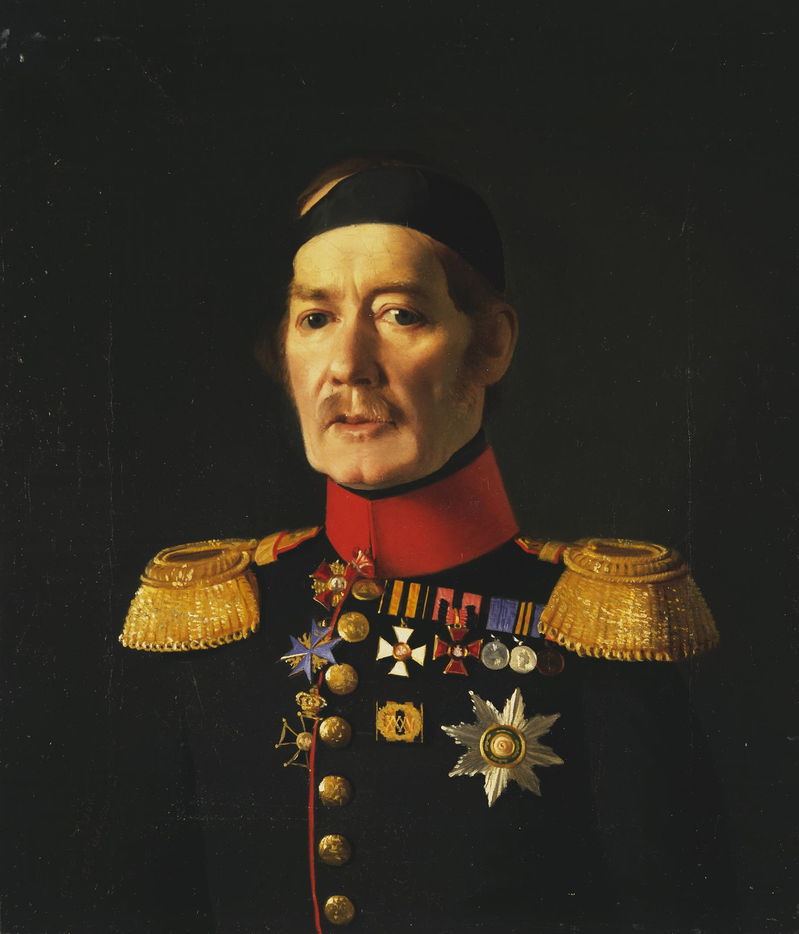 Портрет Евстафия Евстафьевича Баранова